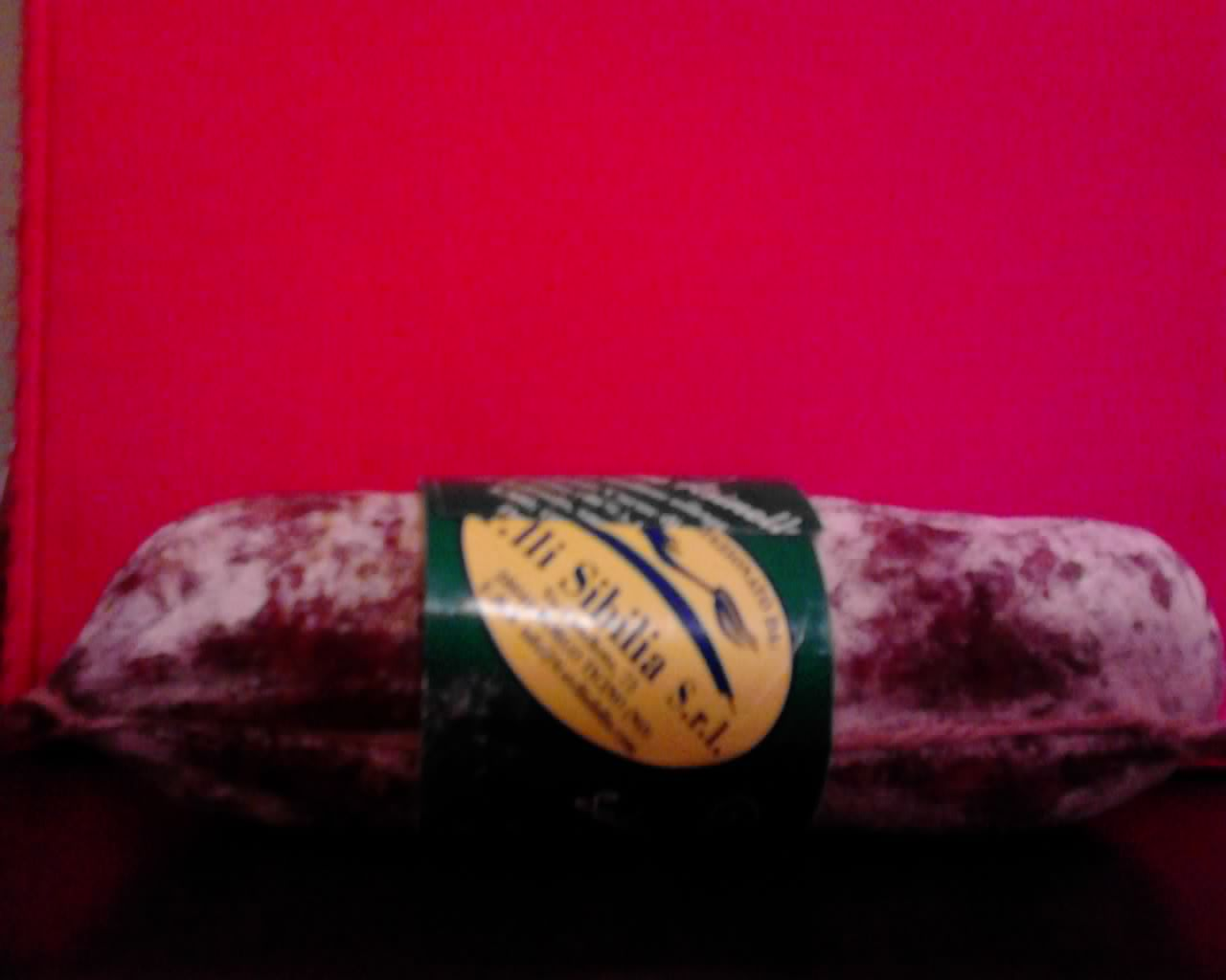 Lumbaart: Salam D'asin Piemuntes